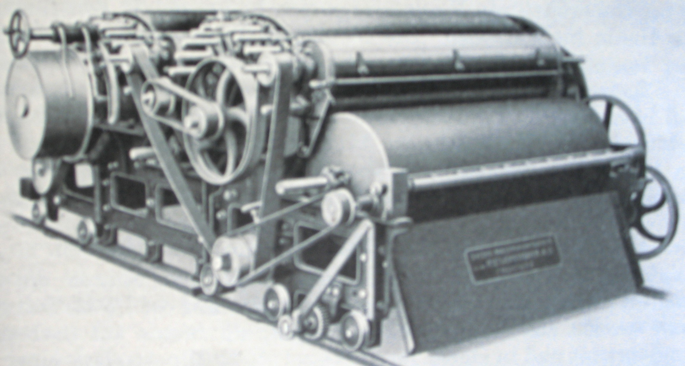 Doppelgarnettöffner (Wollfadenöffner)